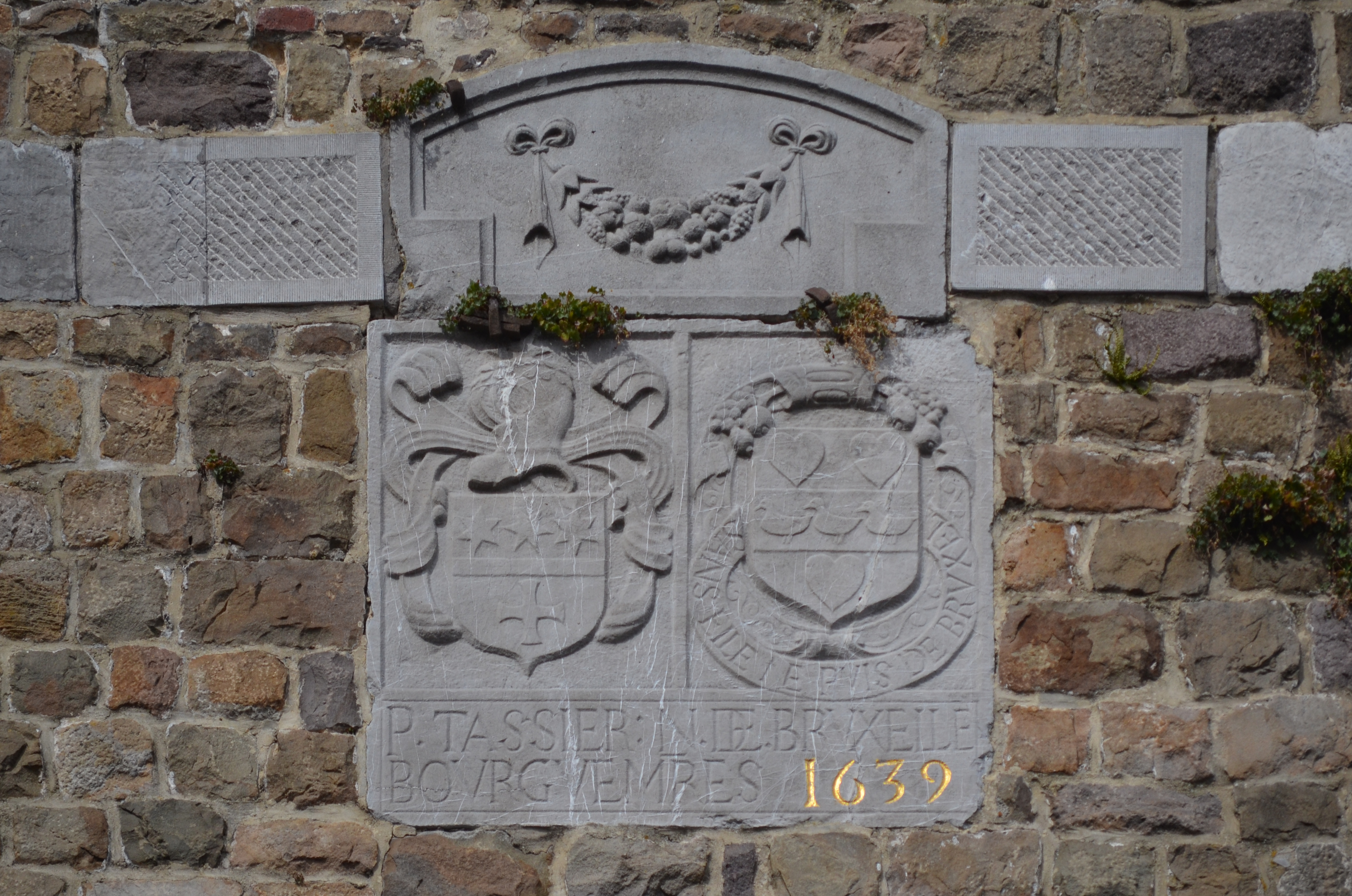 Thuin (Belgique) - Beffroi - Face sud - Armoiries de Pierre le Tassier et Nicolas de Bruxelles, bourgmestres en 1638-1639. This photo of immovable heritage has been taken in the Walloon Region